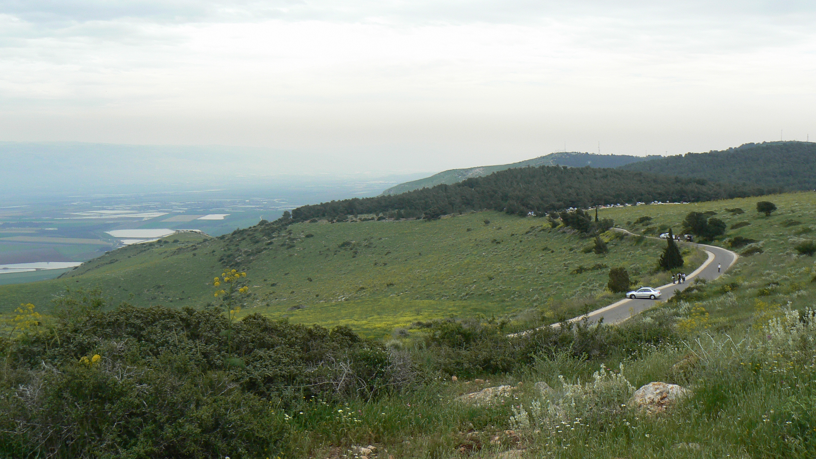 בקעת הירדן בצד שמאל. איזו מין ראות! דוקא בבוקר חשבתי שהולכת להיות ראות טובה. Mount Gilboa